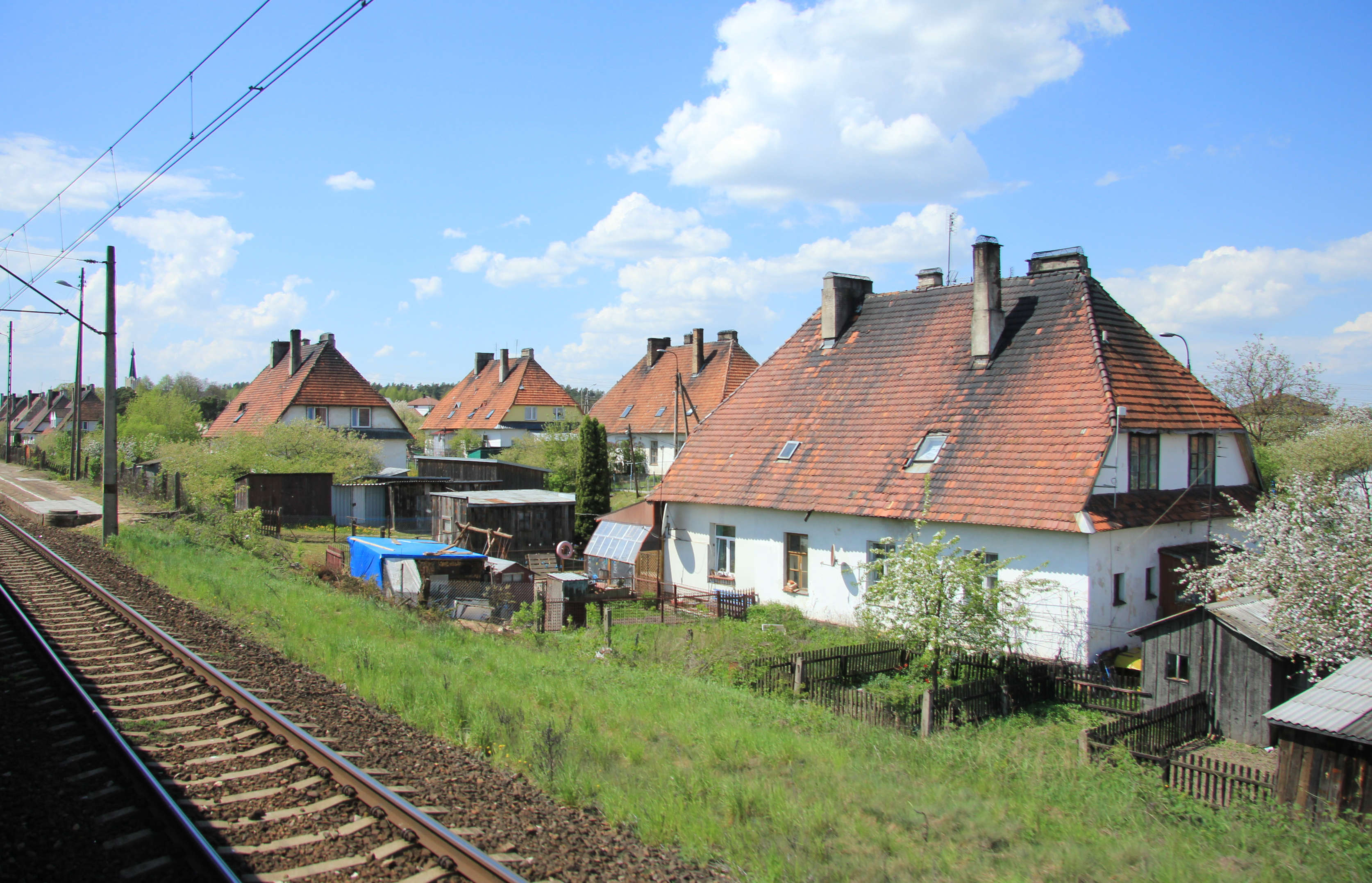 Łapy-Osse osiedle domów kolejowych, woj. podlaskie